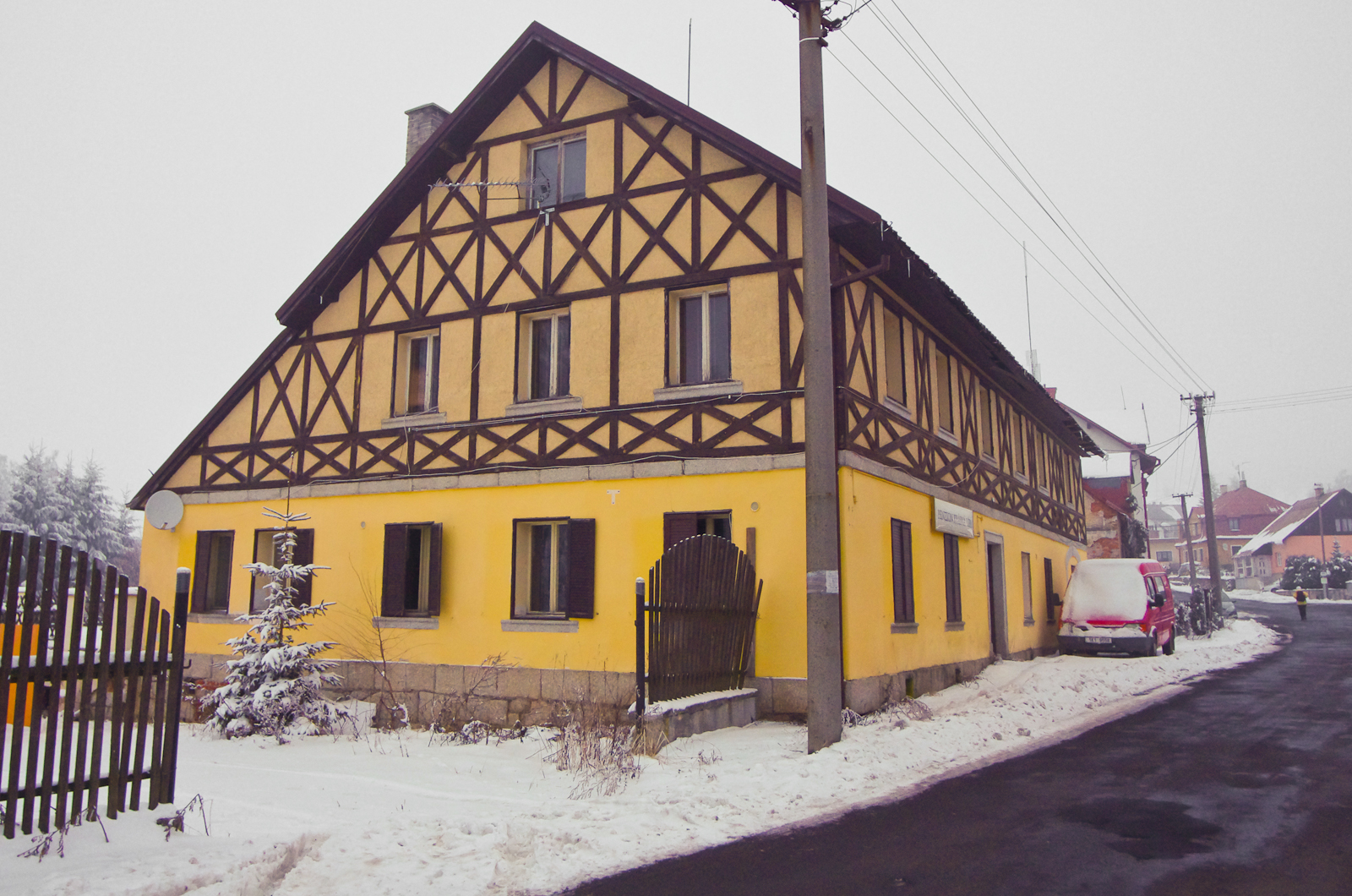 Krásná Lípa u Šindelové, Krušné hory, penzion Krásná Lípa